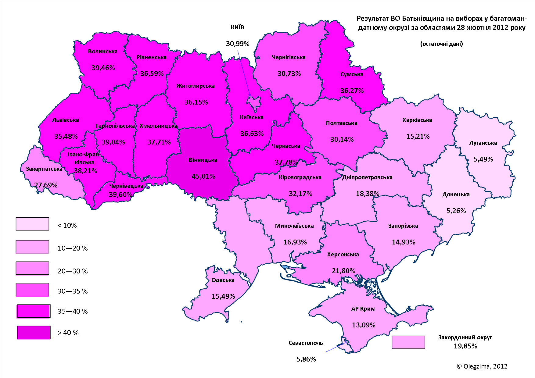 Результат ВО «Батькивщина» по областям на выборах 2012-10-28 по состоянию на на 21:24 02.11.12 —99,61%